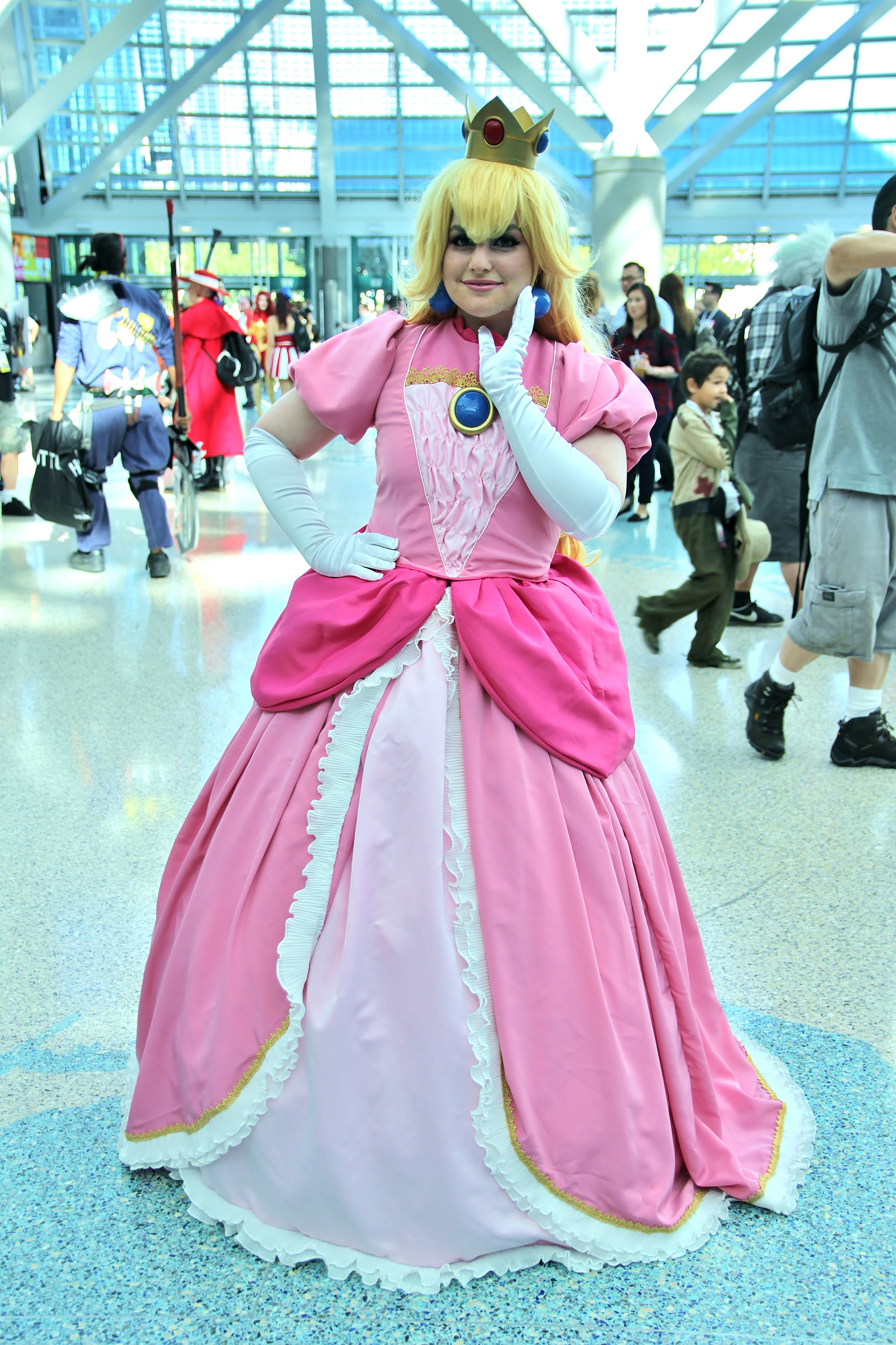 Cosplay at Comikaze Expo 2015.